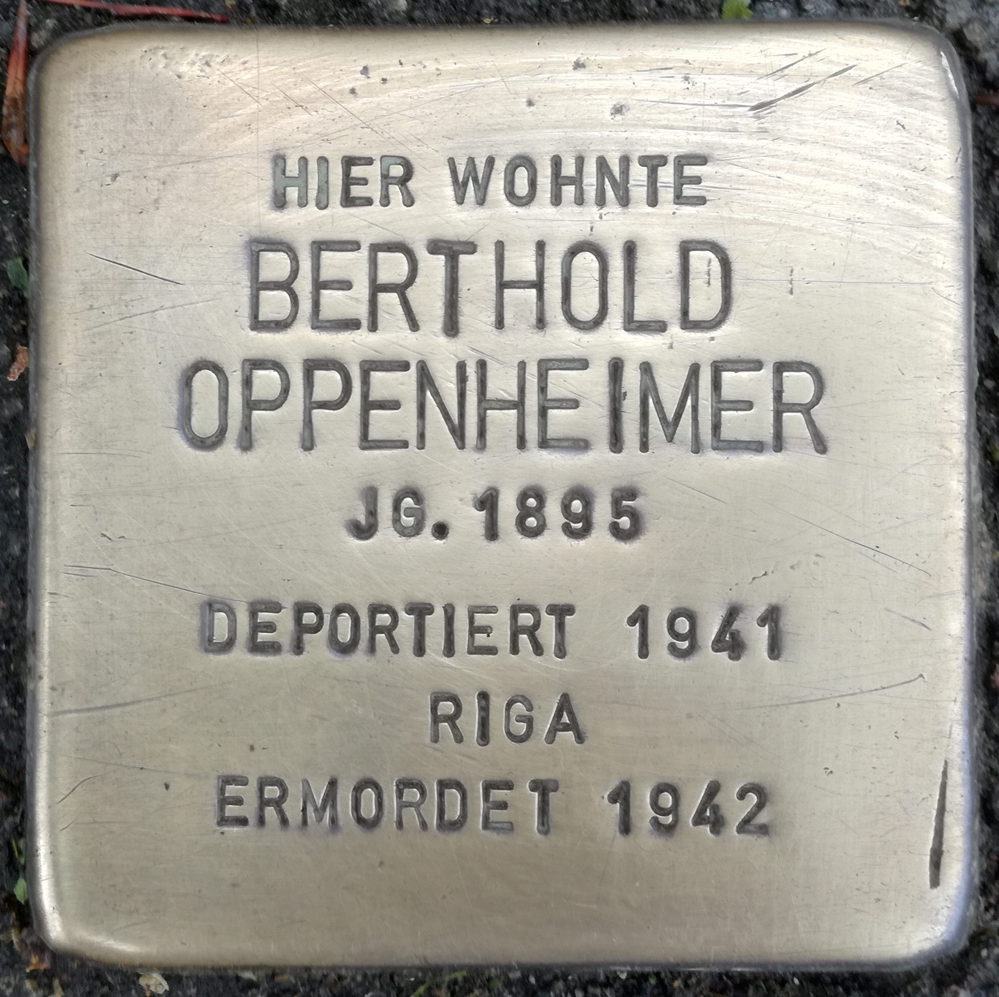 Hier wohnte Berthold Oppenheimer Jahrgang 1895 deportiert 1941 Riga ermordet 1942